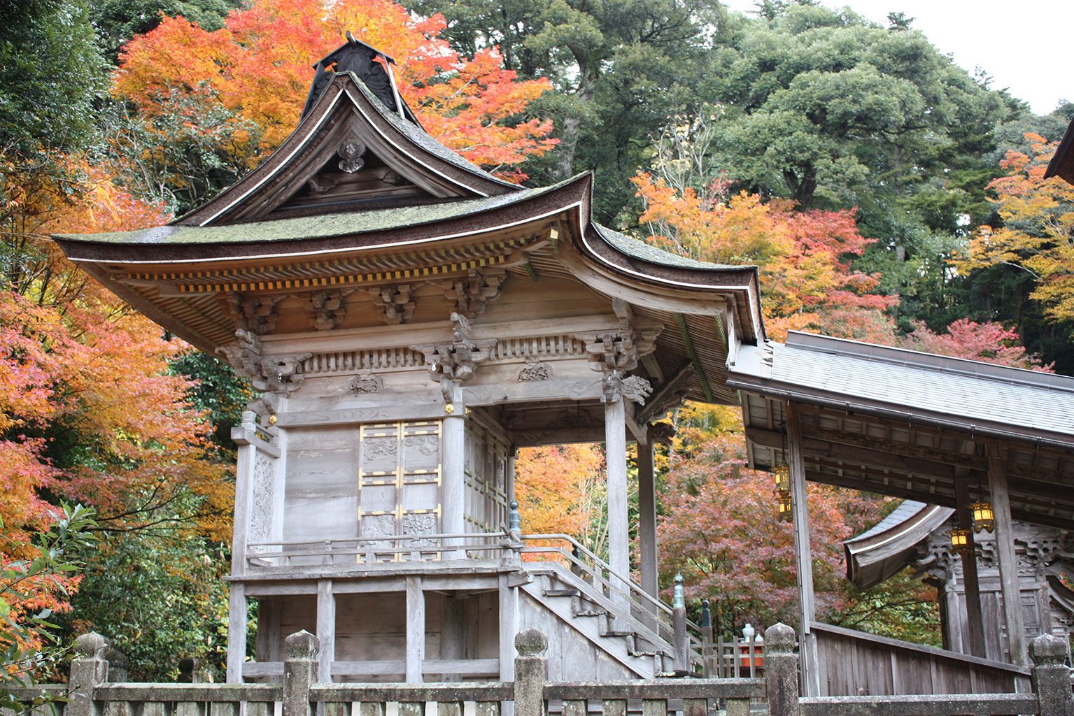 京都府指定文化財・山王宮本殿